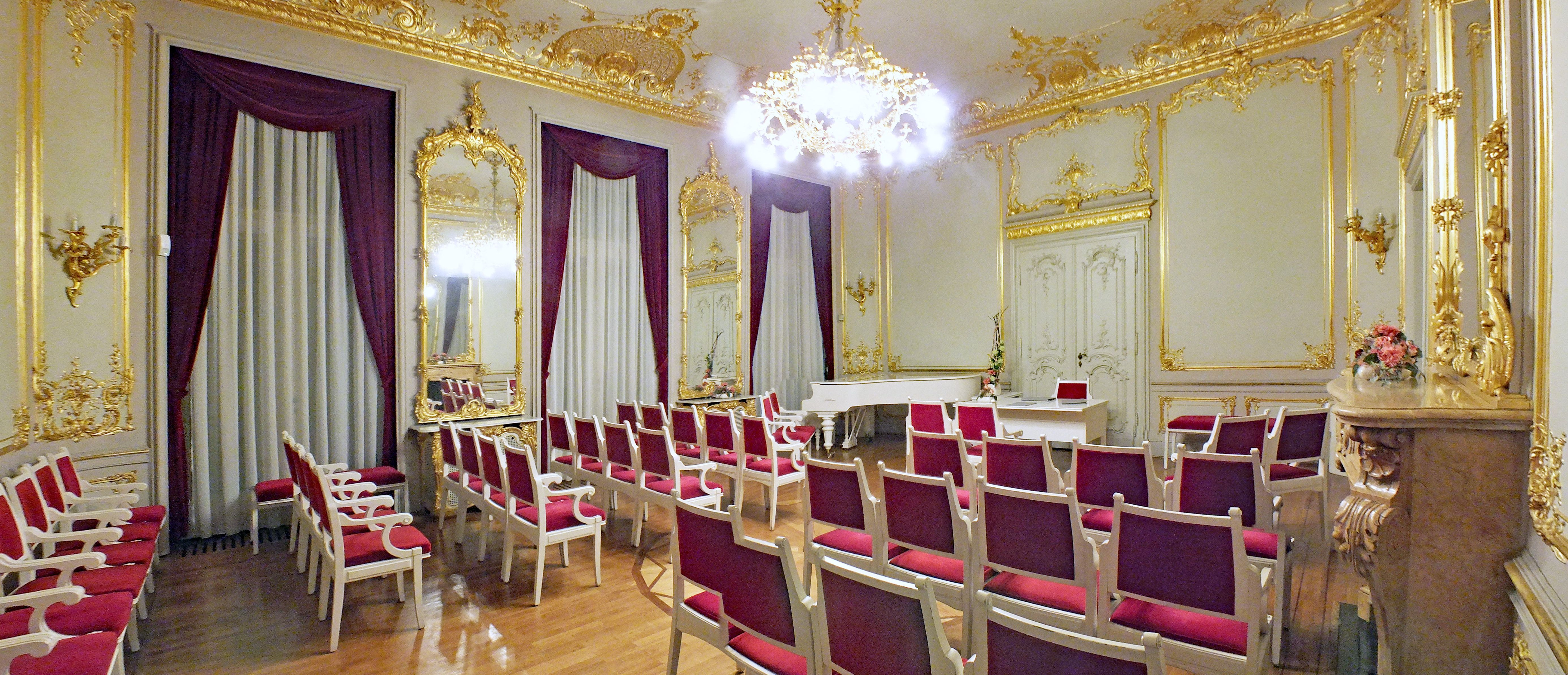 Weißes Haus Markkleeberg, Spiegelsaal